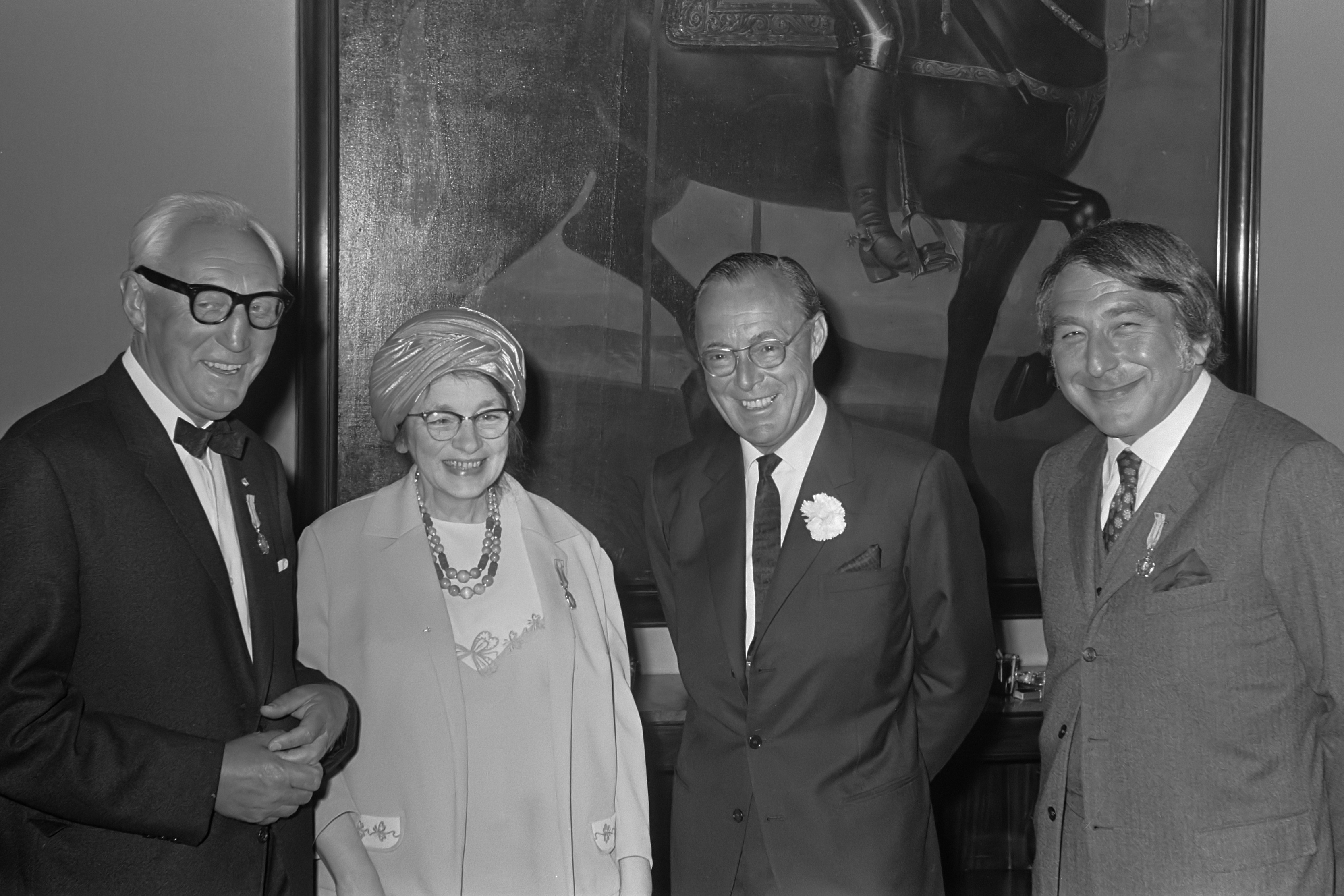 Prins Bernhard reikt Zilveren Anjers uit in het Paleis op de Dam in Amsterdam. V.l.n.r.: Dr. Wumkes, mej. Bijtelaar, Prins Bernhard en Alexander Orlow 25 juni 1969